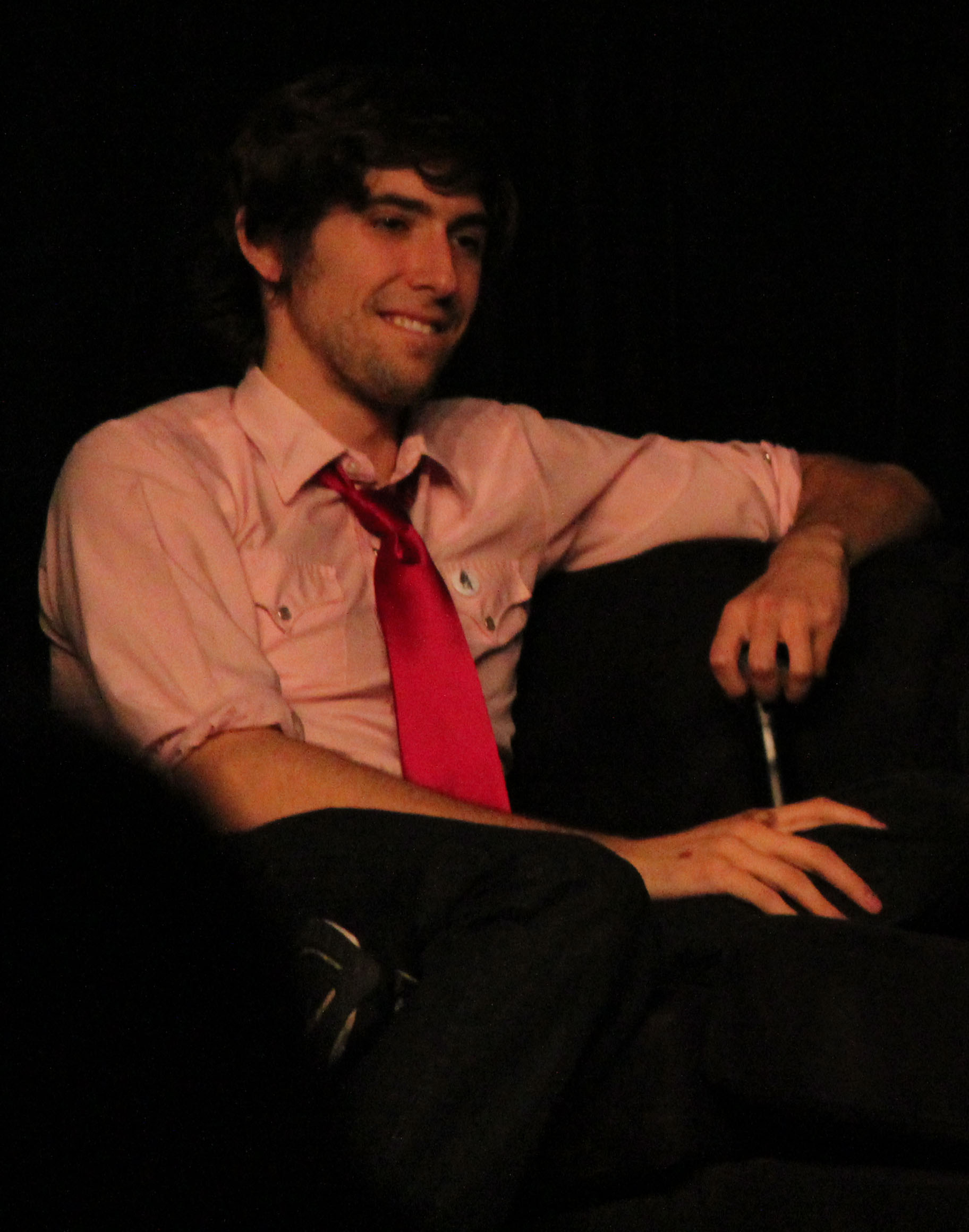 Max Landis and Robert Kirkman